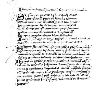 Première page de Schedula diversum artium, Ms BM Paris.